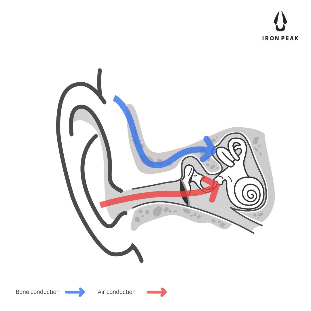 גירוי אוויר מול גירוי עצם